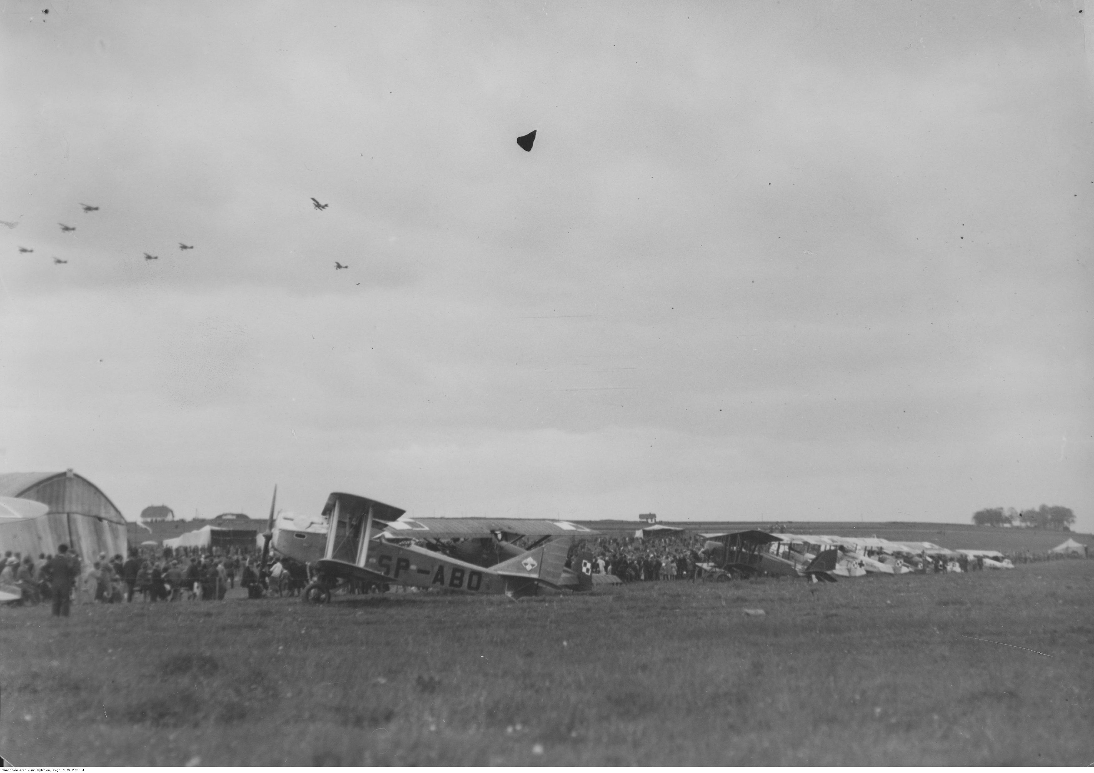 Samoloty na lotnisku i tłum osób uczestniczących w Tygodniu Lotniczym w Krakowie. Na pierwszym planie samolot Ansaldo A300-4 o numerze SP-ABO. Po prawej widoczny Caudron G.III i samoloty sanitarne Hanriot HD-14 (H-28).